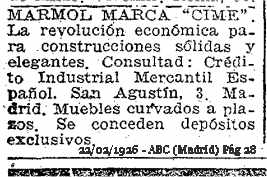 MARMOL MARCA "CIME" La revolución económica para costrucciones solidas y elegantes. Consultad: Credito Industrial Mercantil Español. San Agustin, 3, Madrid. Muebles curvados a plazos. Se conceden depositos exclusivos.